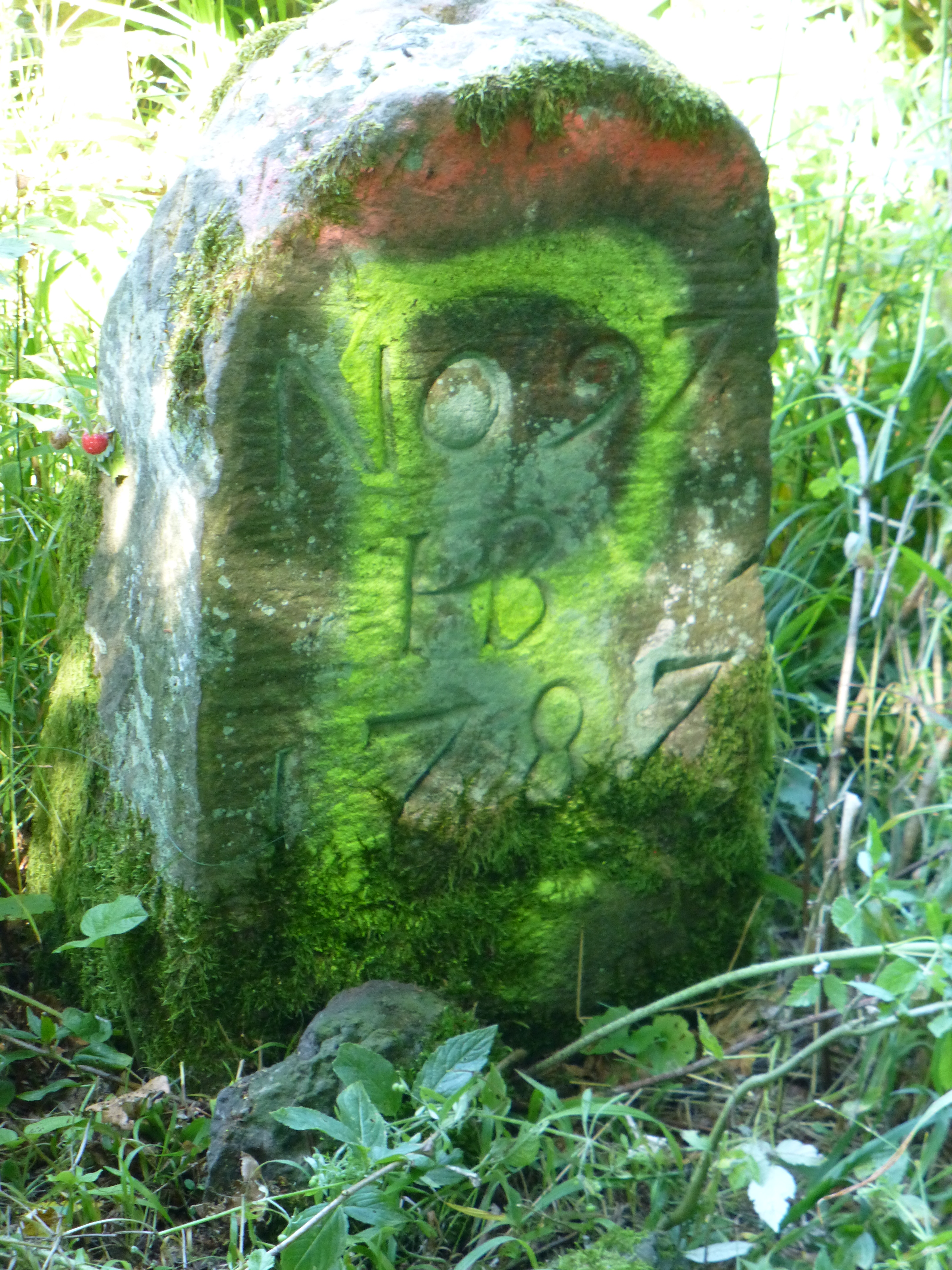 Hutestein auf dem Schwengeberg